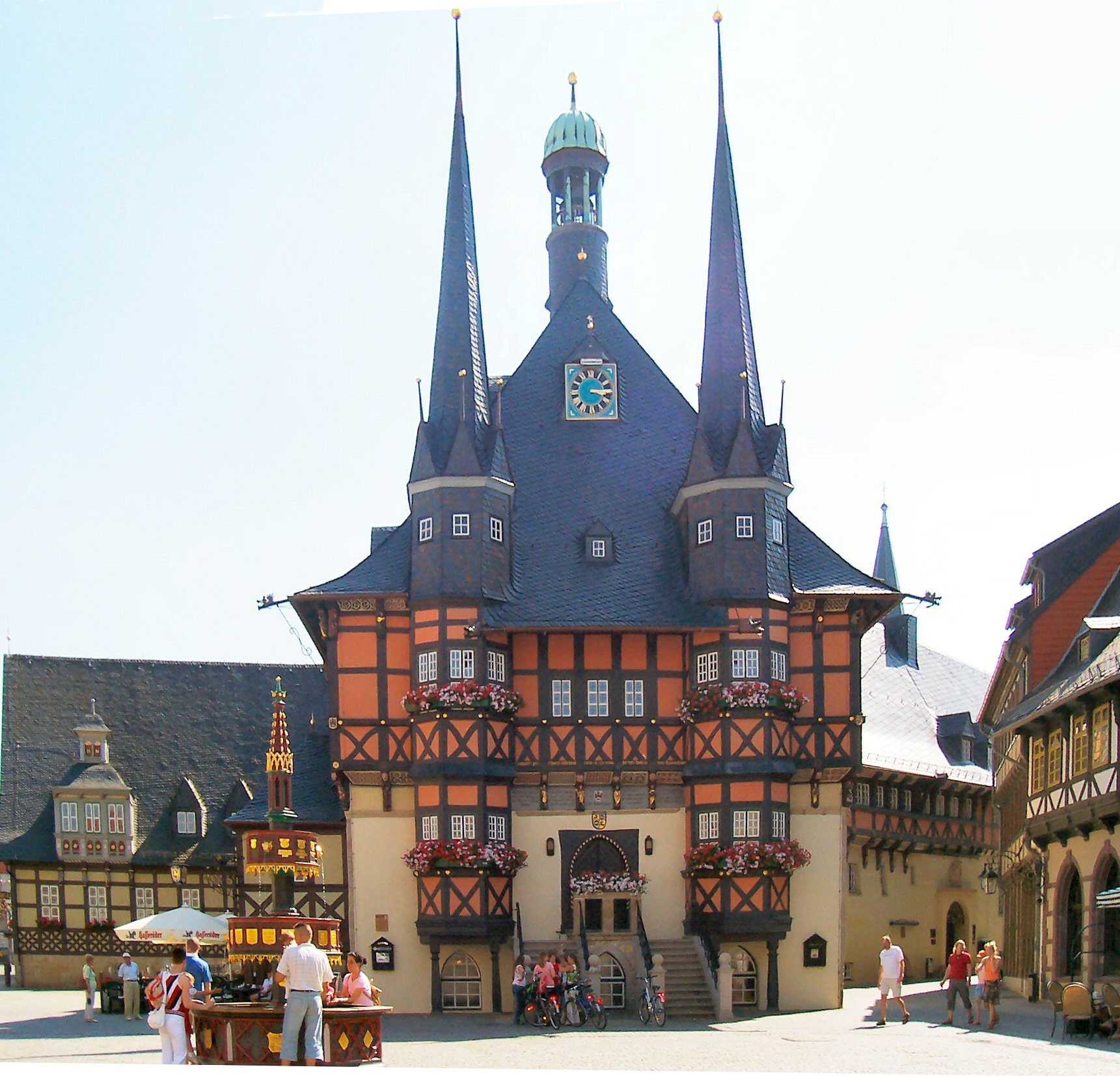 Rathaus von Wernigerode